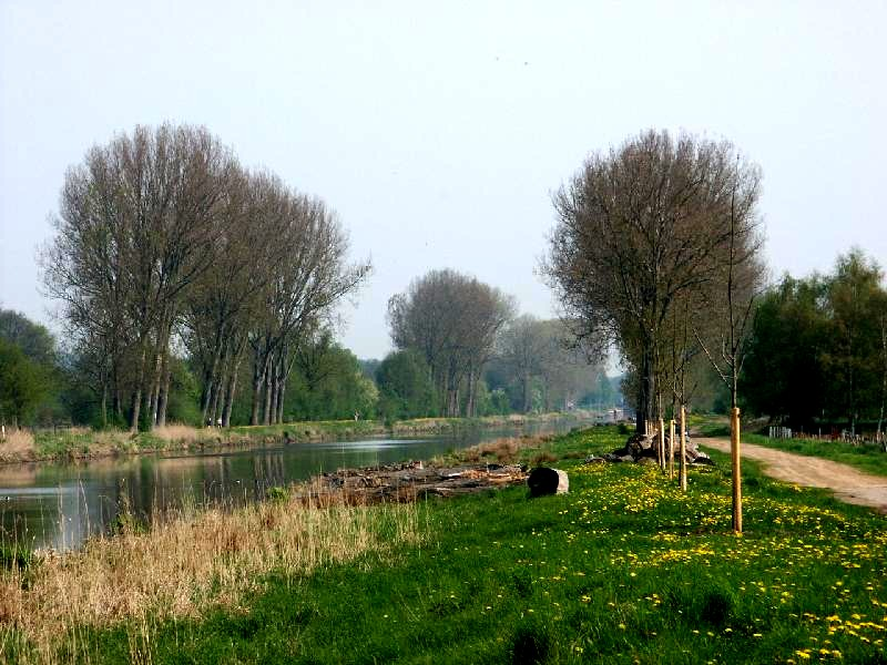 Elbe-Lübeck-Kanal bei Dalldorf, Blick nach Norden